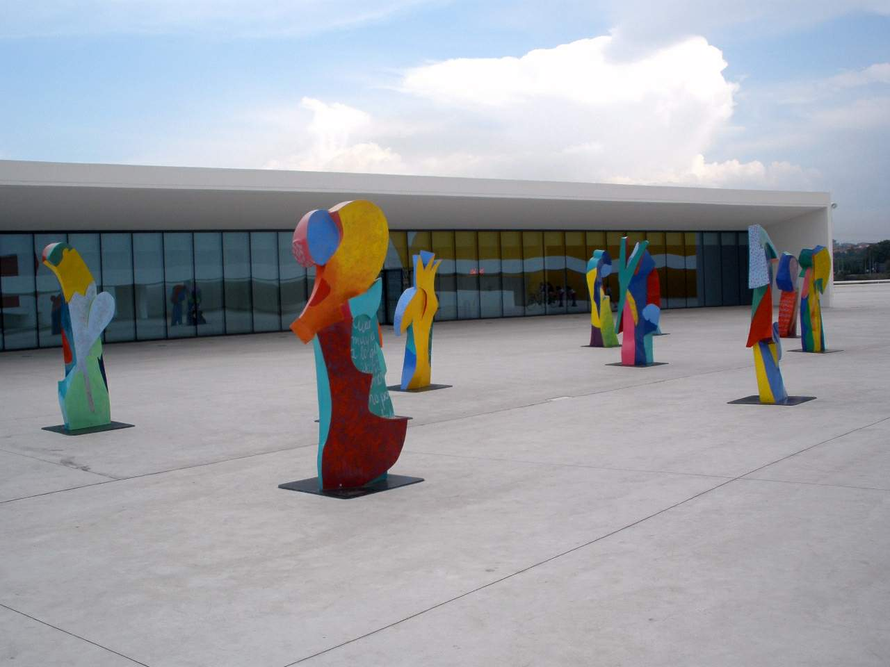 Esculturas de Cristóbal Gabarrón en el Centro Cultural Internacional Oscar Niemeyer (Avilés, Asturias, España). Exposición verano 2011